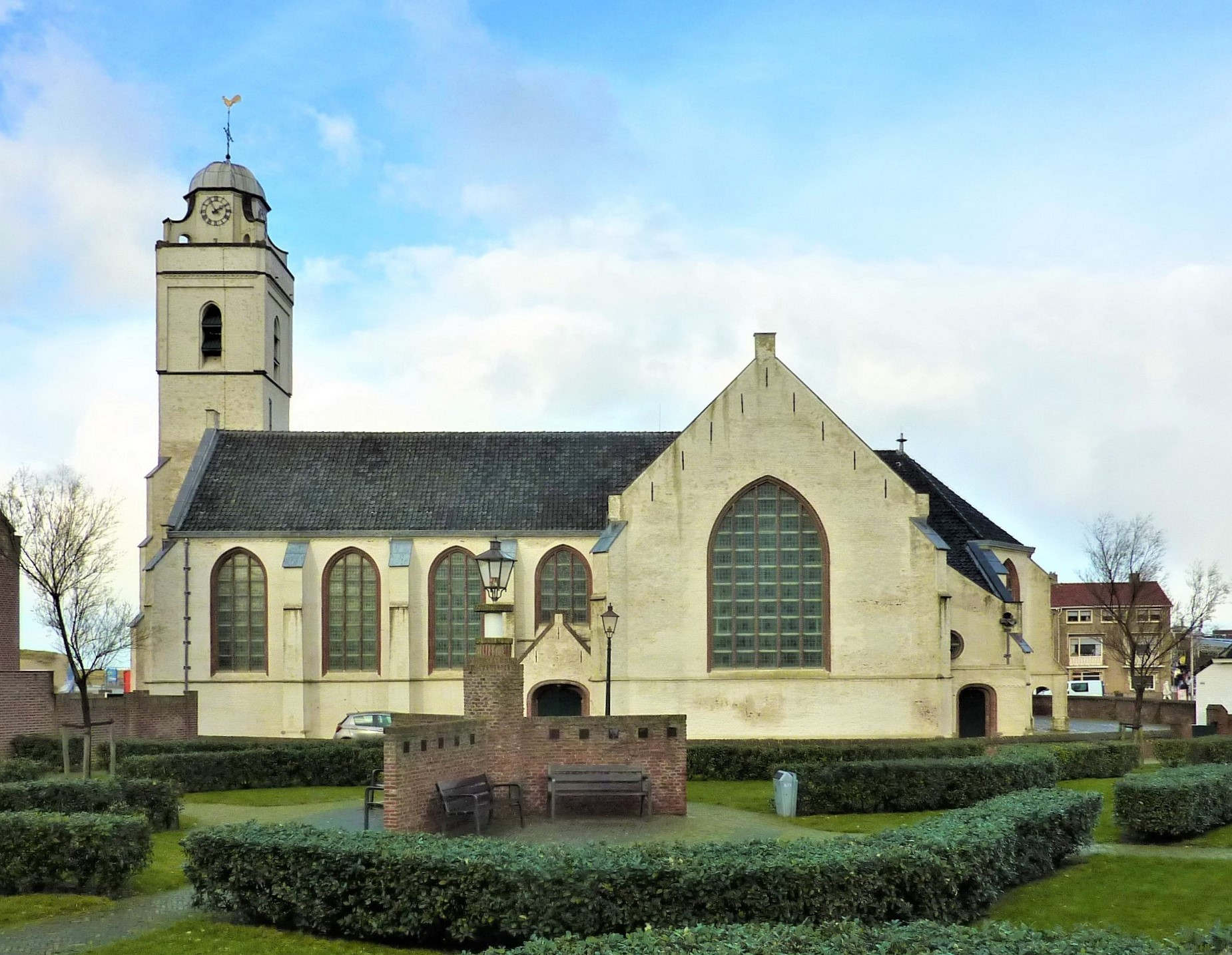 Andreaskerk (Katwijk aan Zee)